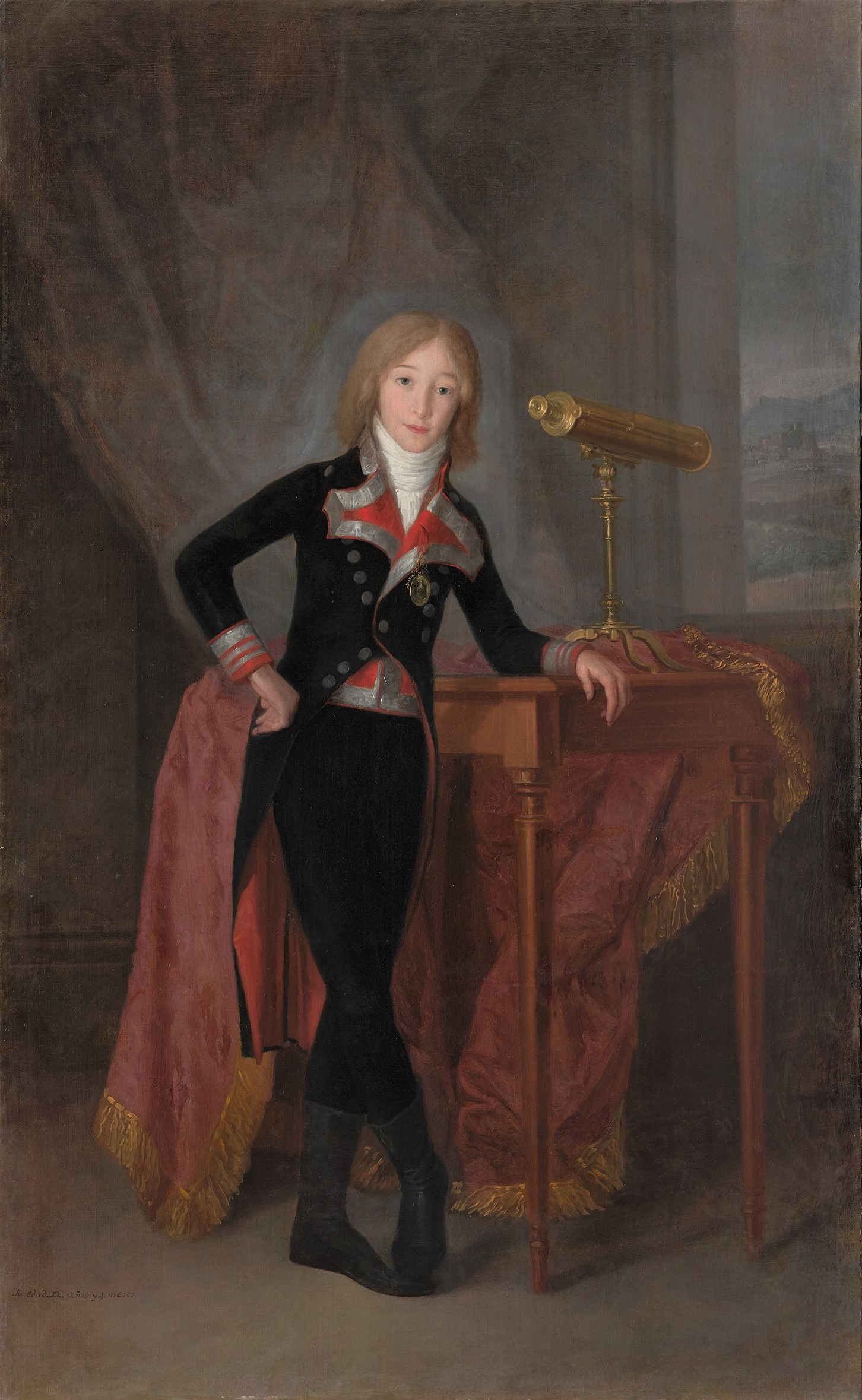 Probable retrato de Francisco de Borja Téllez-Girón, futuro X duque de Osuna (1785-1820) o de su hermano Pedro de Alcántara, Prince of Anglona (1786-1851).